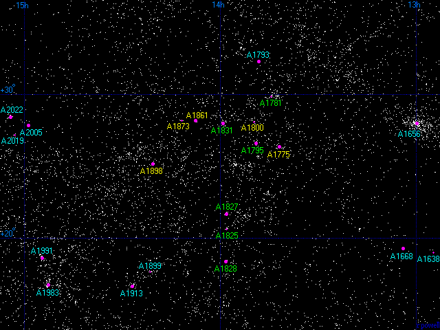 Bootes Supercluster